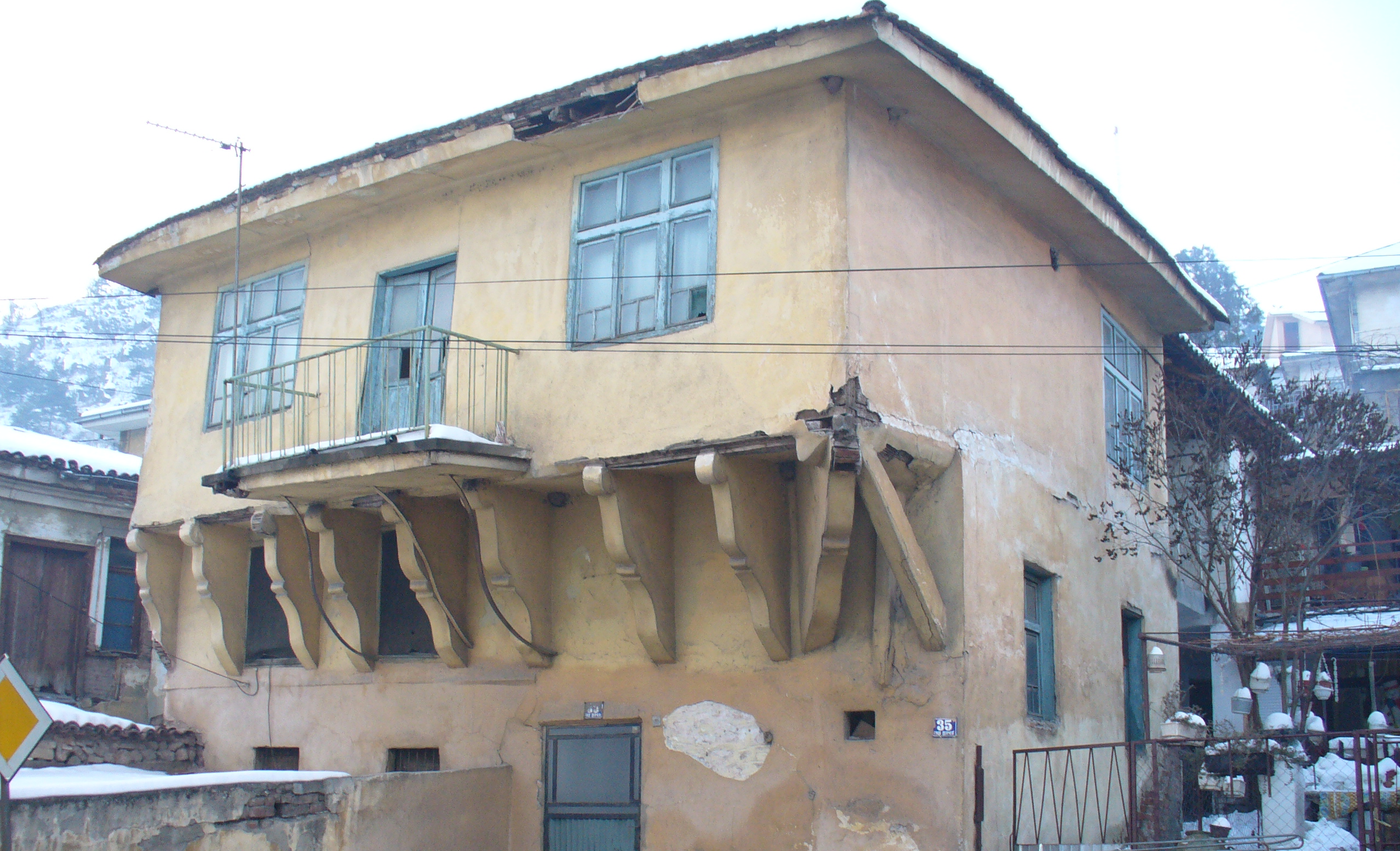 Стара къща в Щип, Република Македония.